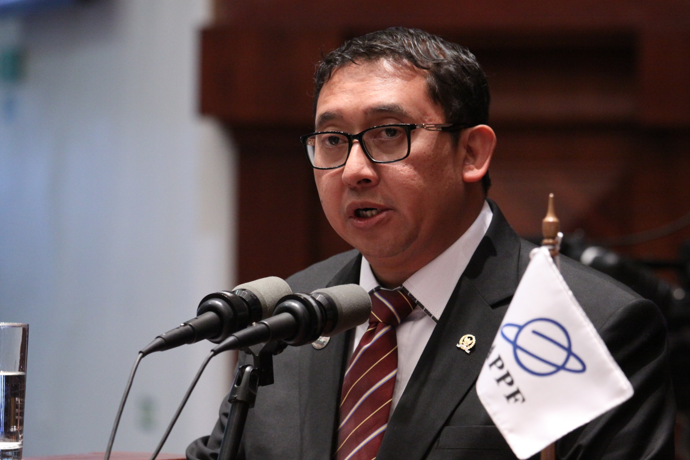 Quito, 12 enero de 2015.- Shigeru Tanaka de la Delegación de Japón interviene en la Primera sesión plenaria y situación internacional: Política y Seguridad Fotografía: Hugo Ortiz / Asamblea Nacional